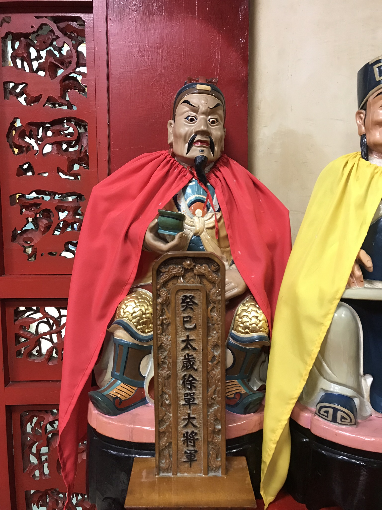 癸巳太歲徐單大將軍神像